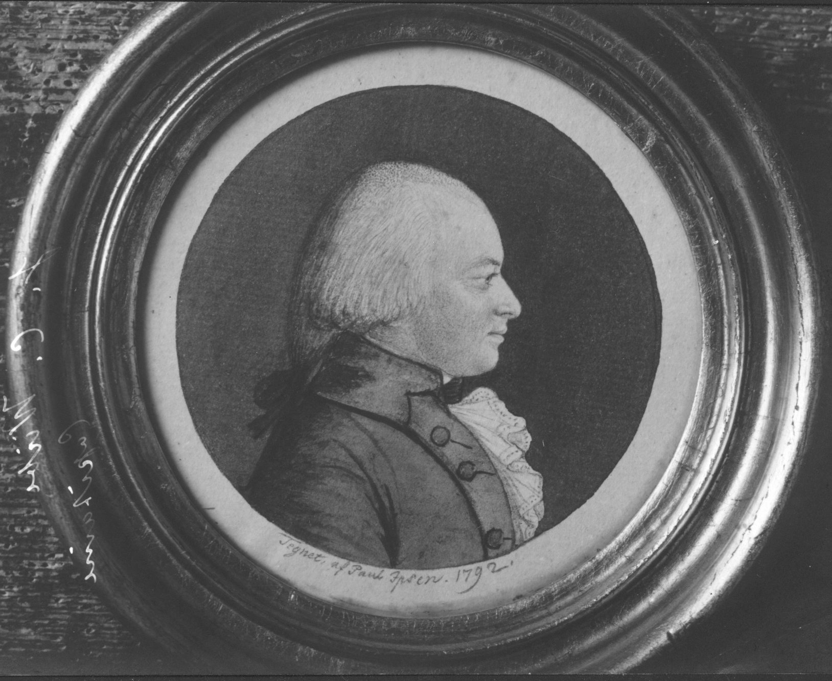 Miniatyr av Joachim Christian Vibe, Repro av Væring , Norsk portrettarkiv, Riksantikvaren